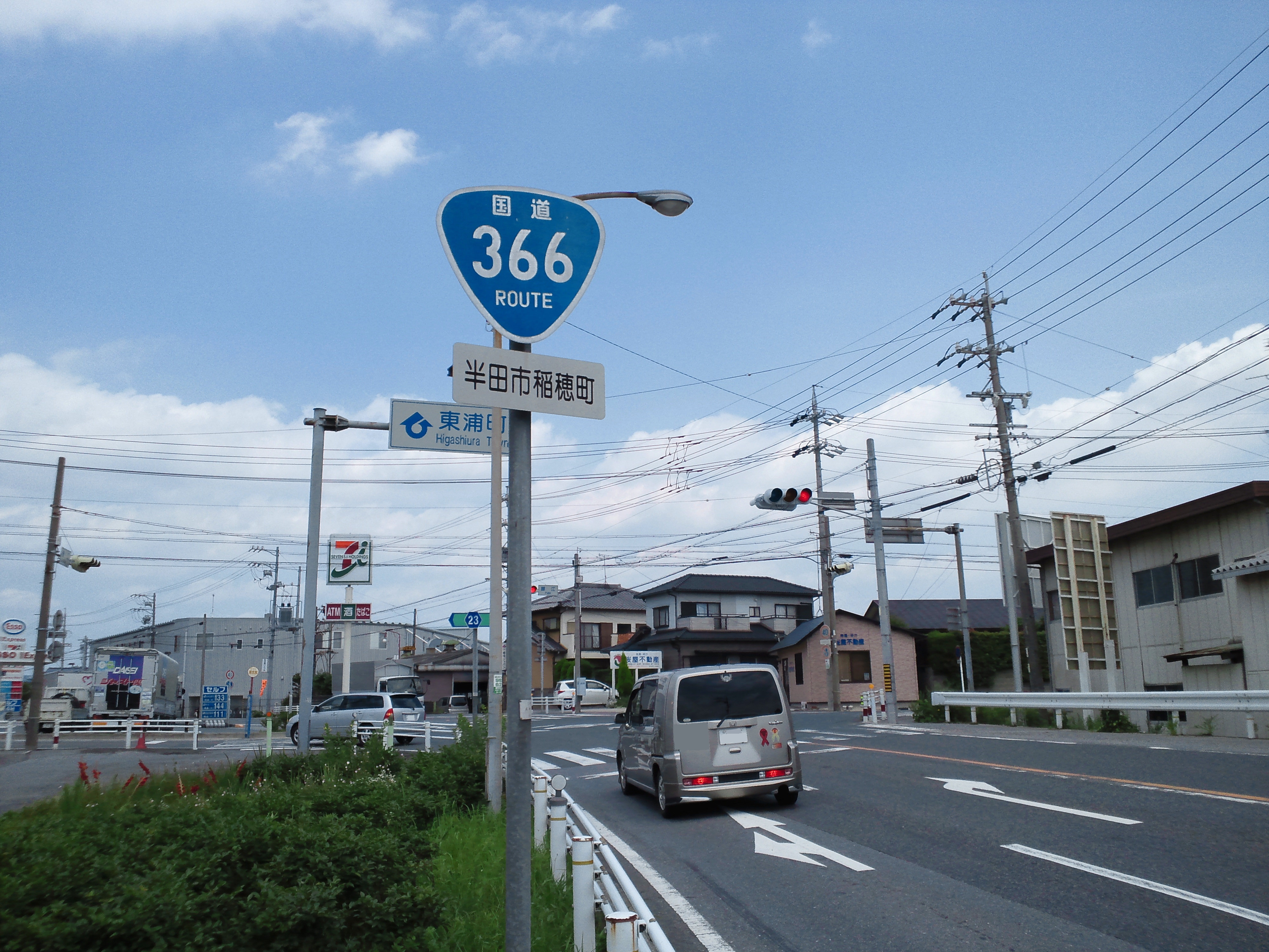 国道366号。半田市と東浦町の境界付近で撮影。